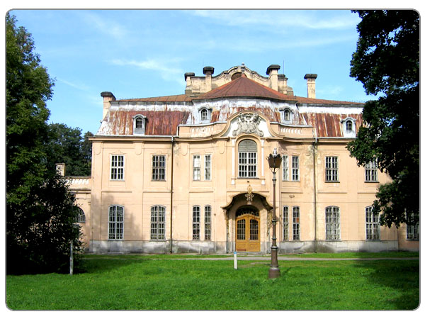 Pałac Goetz'a w Brzesku - na zdjęciu część zachodnia.